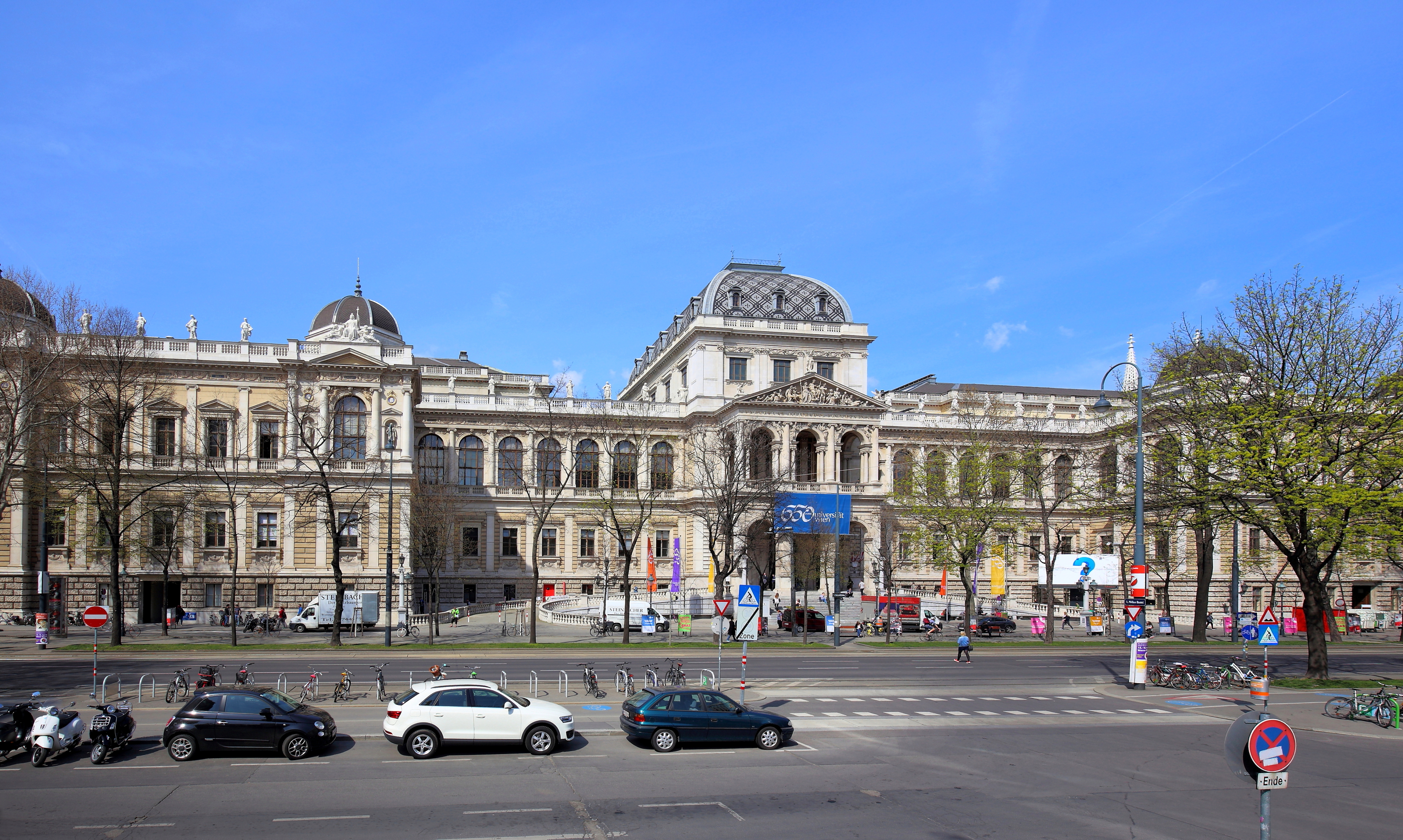 Fassade des Hauptgebäudes der Universität Wien am Universitätsring in der österreichischen Bundeshaupstadt Wien. Das Universitätsgebäude wurde von 1877 bis 1884 nach Plänen des Architekten Heinrich von Ferstel errichtet.